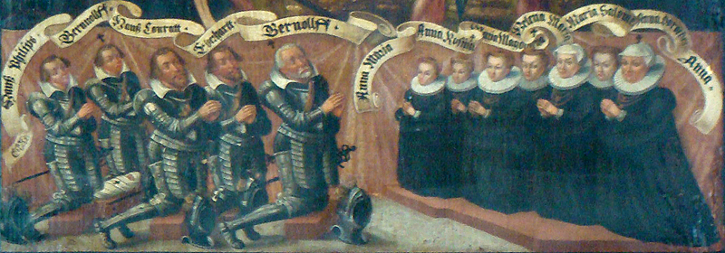 Detail vom Epitaph des Bernolf von Gemmingen zu Bürg († 1609) und seiner Frau Anna von Grumbach († 1607) in der Nikolauskirche in Neuenstadt am Kocher.